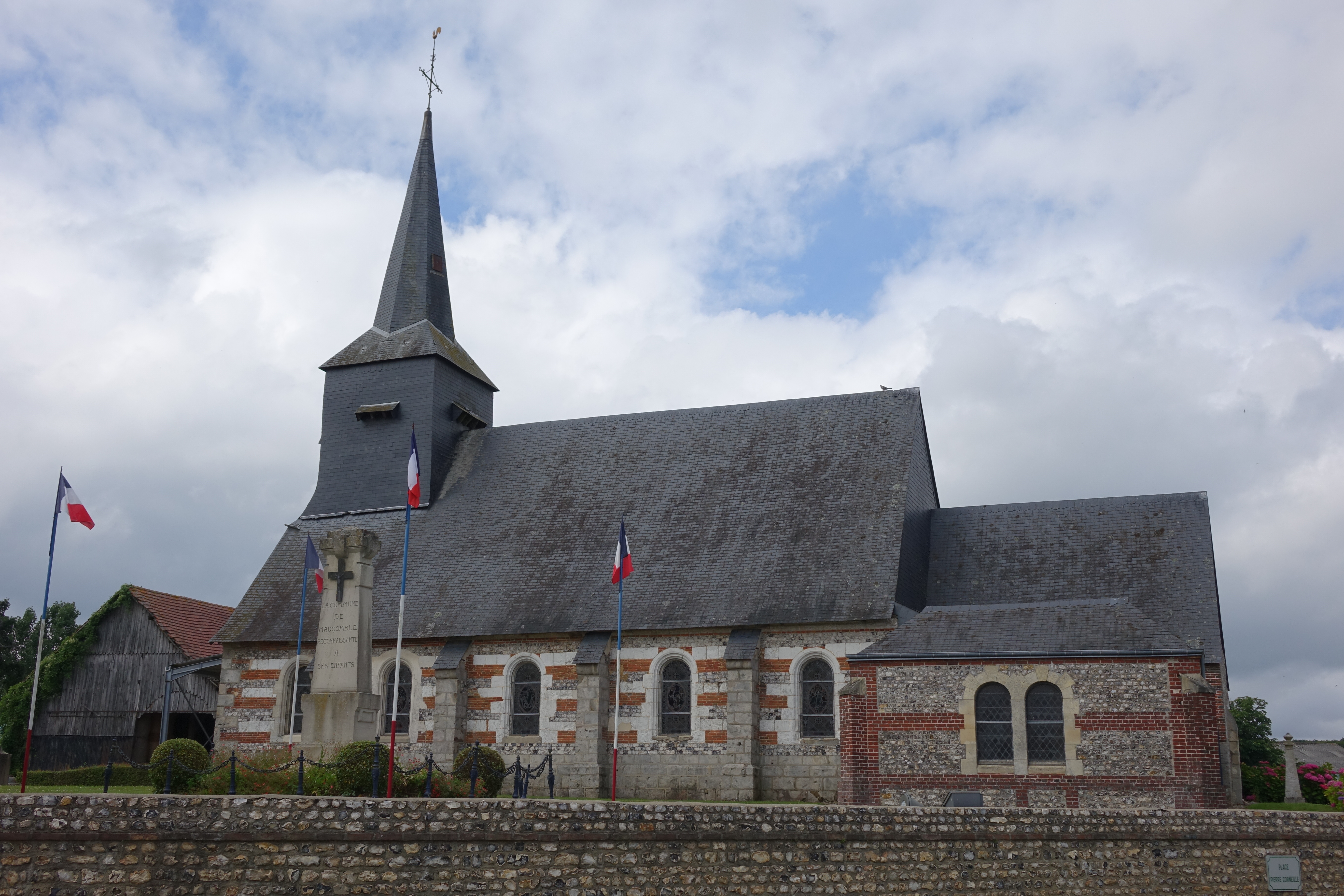 Église de Maucomble, Seine-Maritime, France